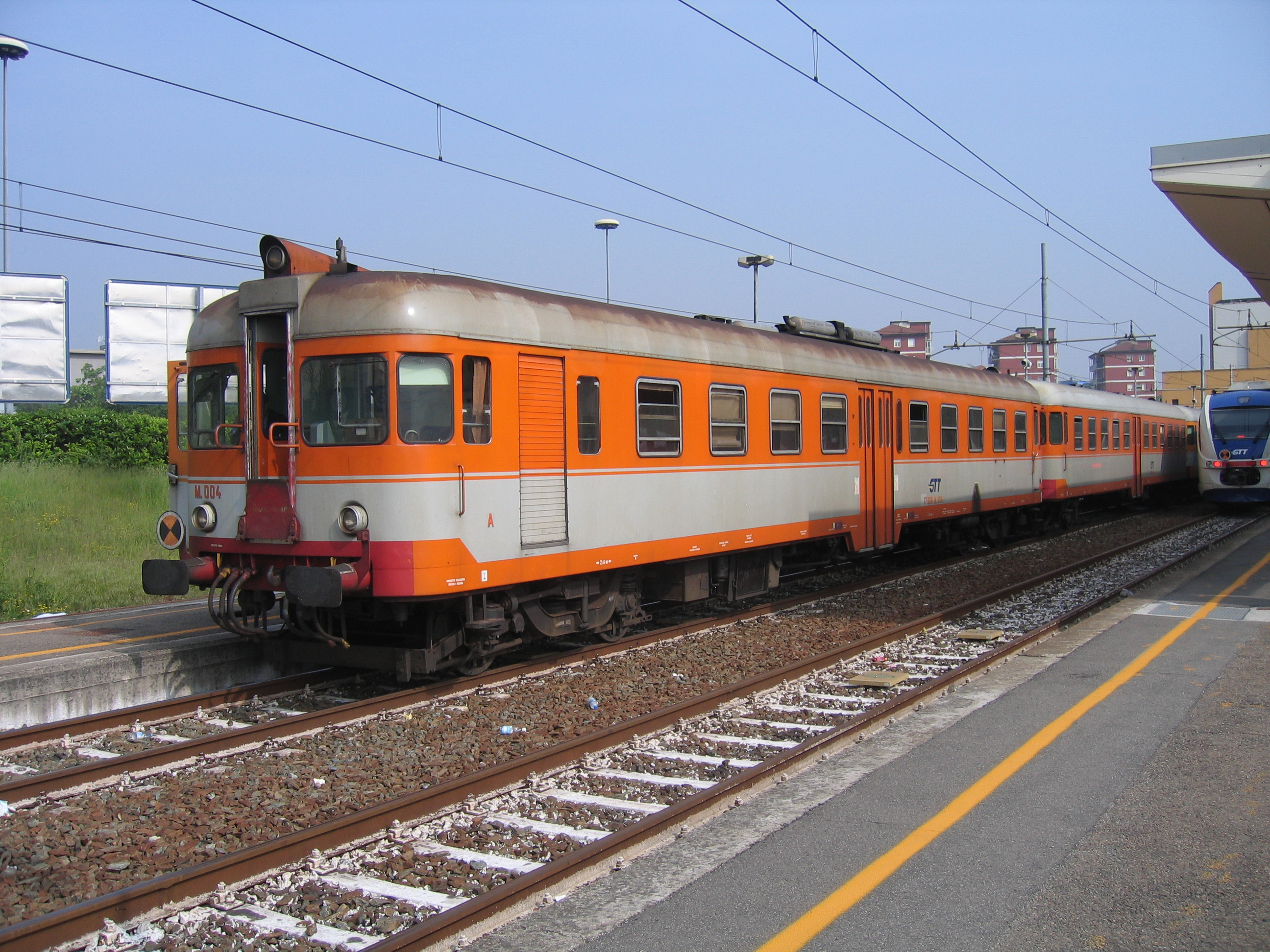 Automotrice GTT ex SATTI M.004 in sosta a Torino Lingotto.